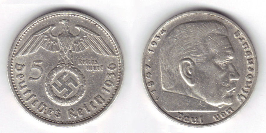 5 Reichsmark, Deutsches Reich 1936, Silbermünze, Bayrisches Hauptmünzamt München (D)